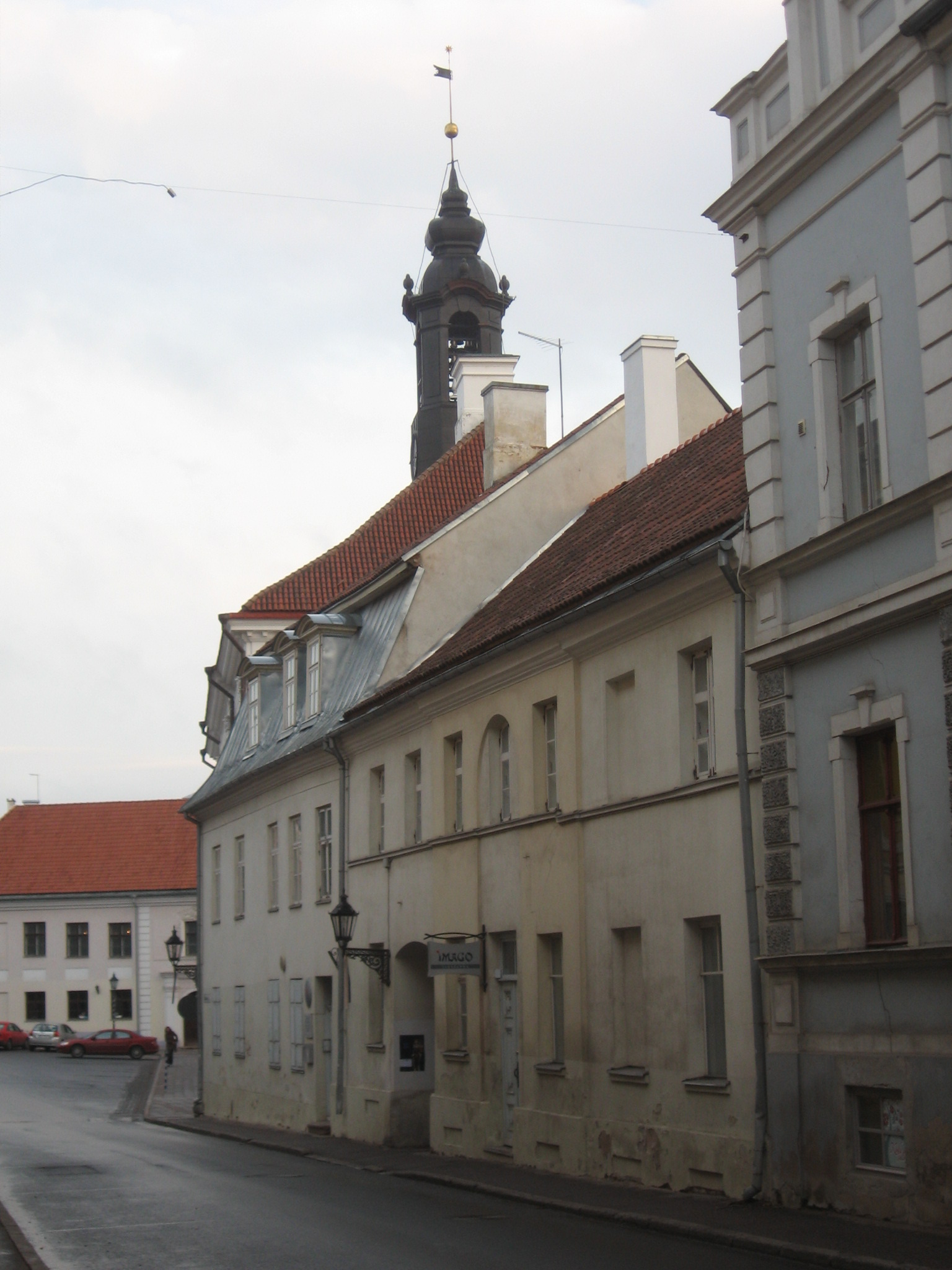 Elamu Tartus Raekoja pl.1 Ülikooli 7